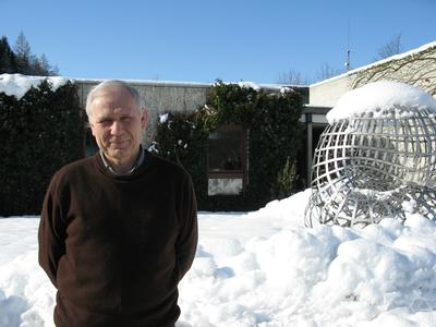 Foto di Ari Laptev